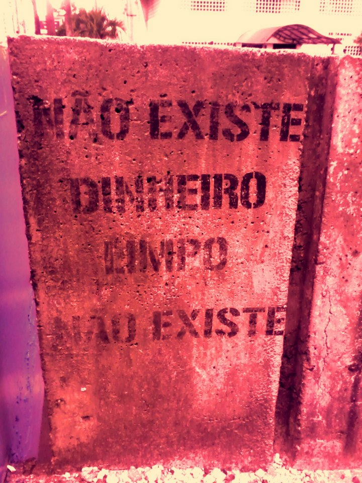 Este "stencil" esta localizado no viaduto entre as ruas Ubaldino do Amaral e Visconde de Guarapuava, no Bairro Alto da XV em Curitiba, PR. Coloco-o aqui devido ao meu temor de que exista alguma reforma idiota que o destrua, (principalmente na paranoia copa do mundo 2014) mas o mais legal e passar pela experiencia de olha-lo em seu contexto. Nao sei quem fez, acho que foi Ninguem.